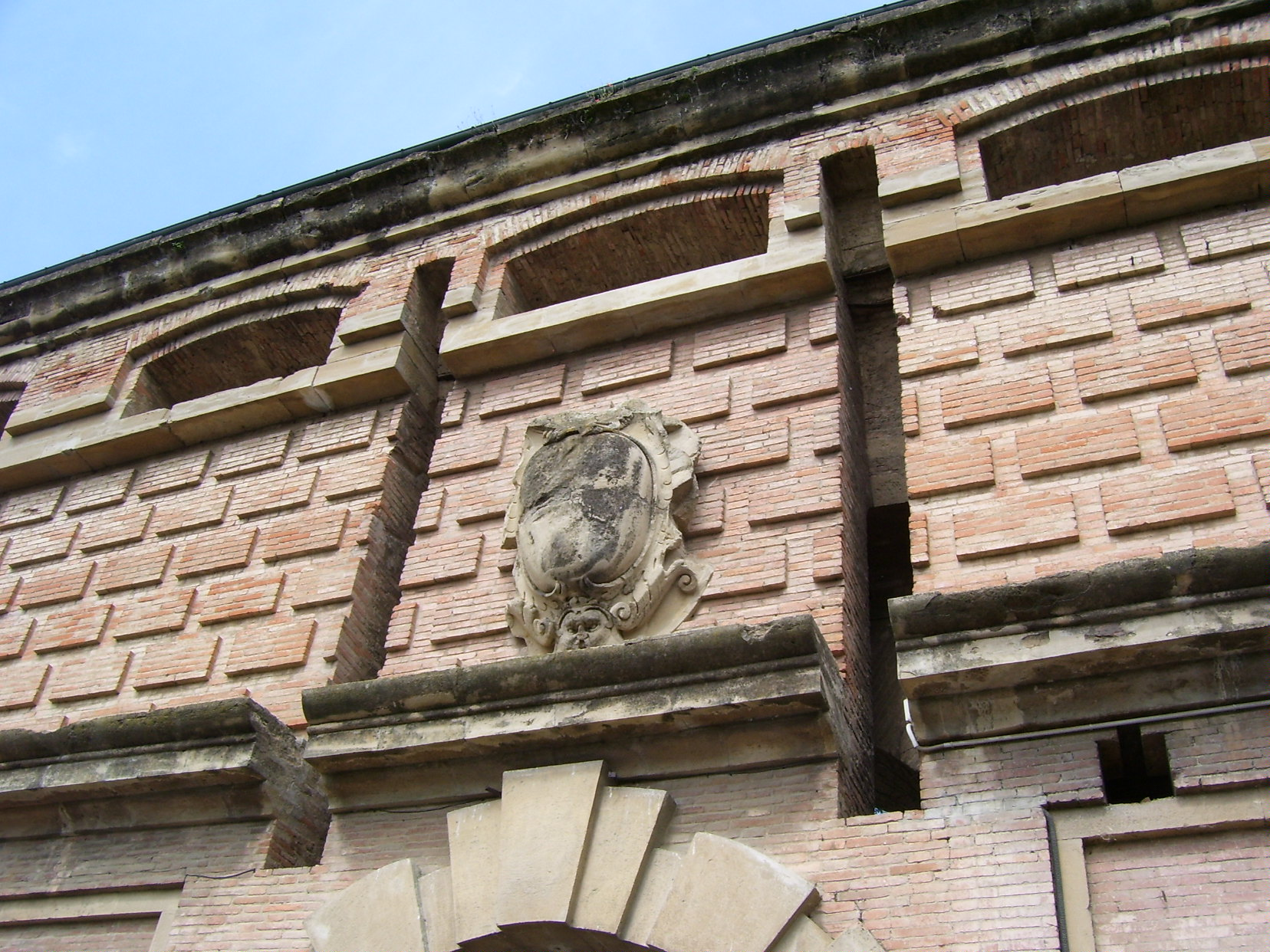 Stemma presente sull'entrata principale de Forte Urbano a Castelfranco Emilia